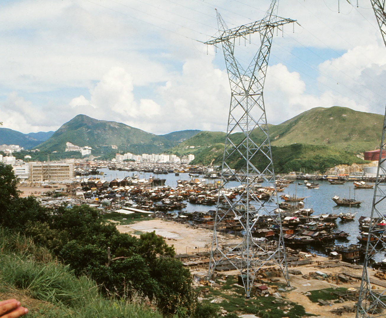 Hong Kong Ap Lei Chau in 1971